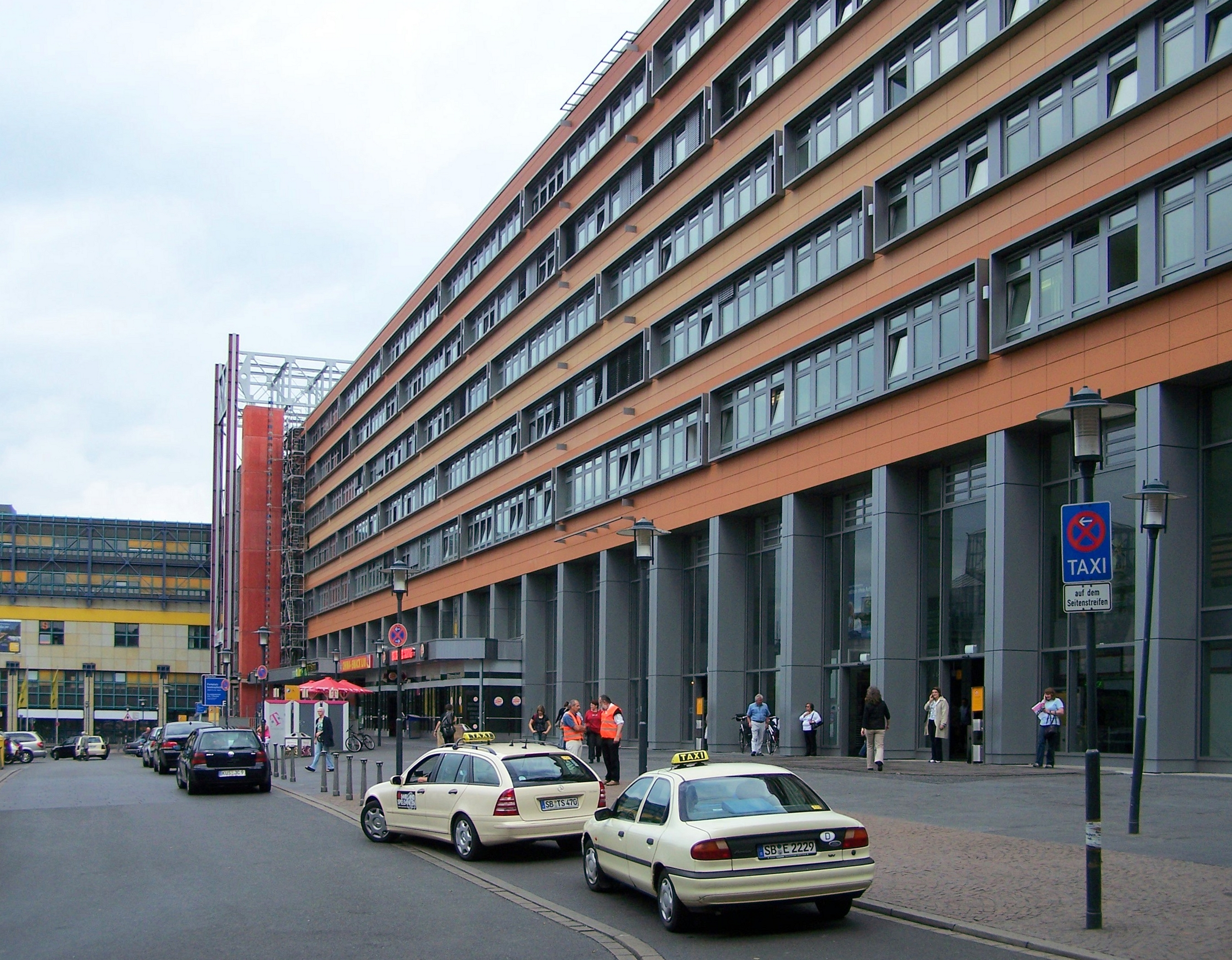 Seitlicher Blick auf den komplett renovierten Saarbrücker Hauptbahnhof (auch Eurobahnhof Saarbrücken)